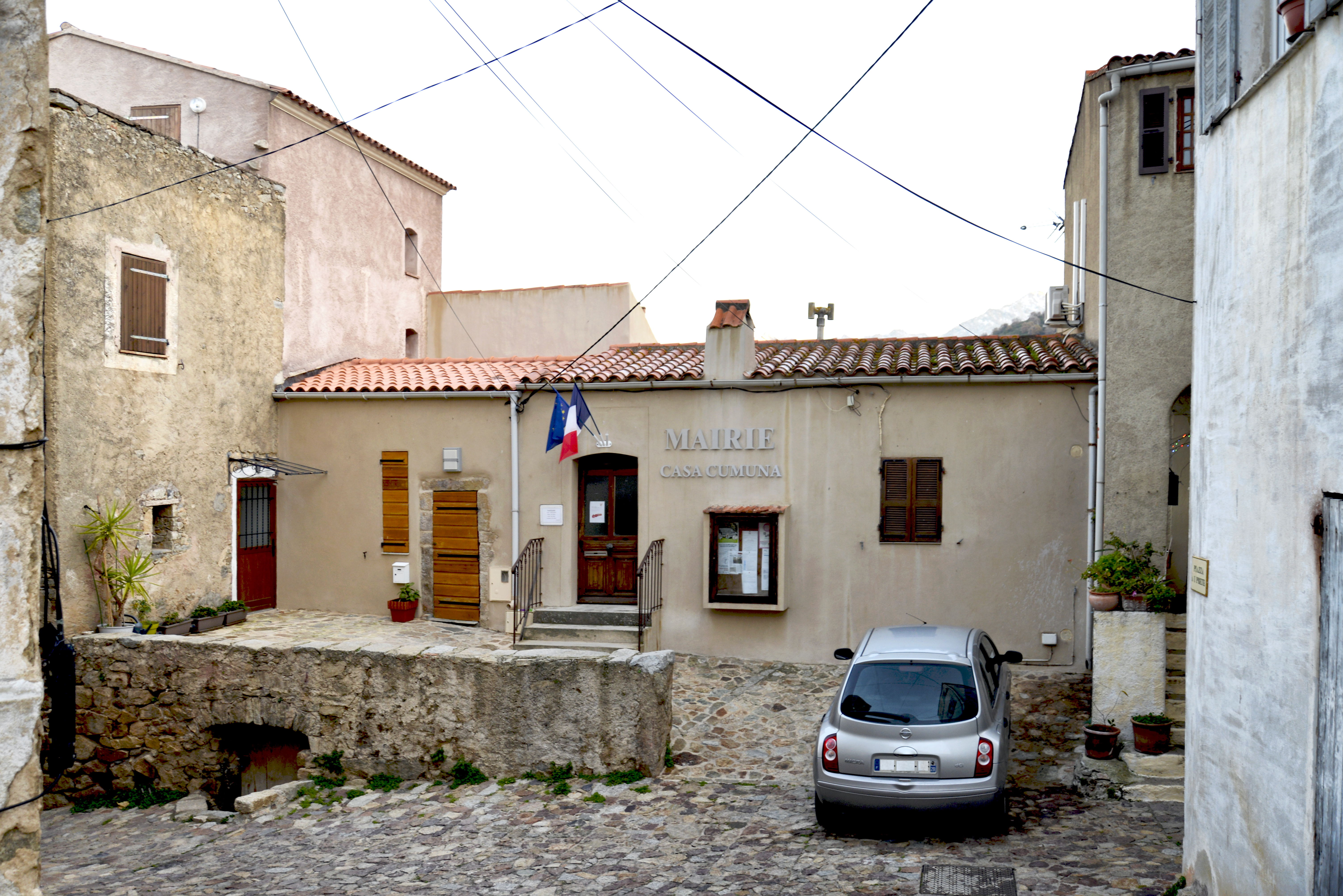 Lavatoggio, Balagne (Haute-Corse) - La mairie (Casa comuna), piazza a u prete.